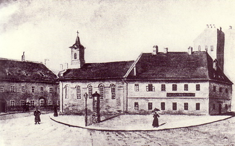 Evangelische Kirche am Burgberg zu Ofen (heute Budapest). Wurde 1896 abgerissen.